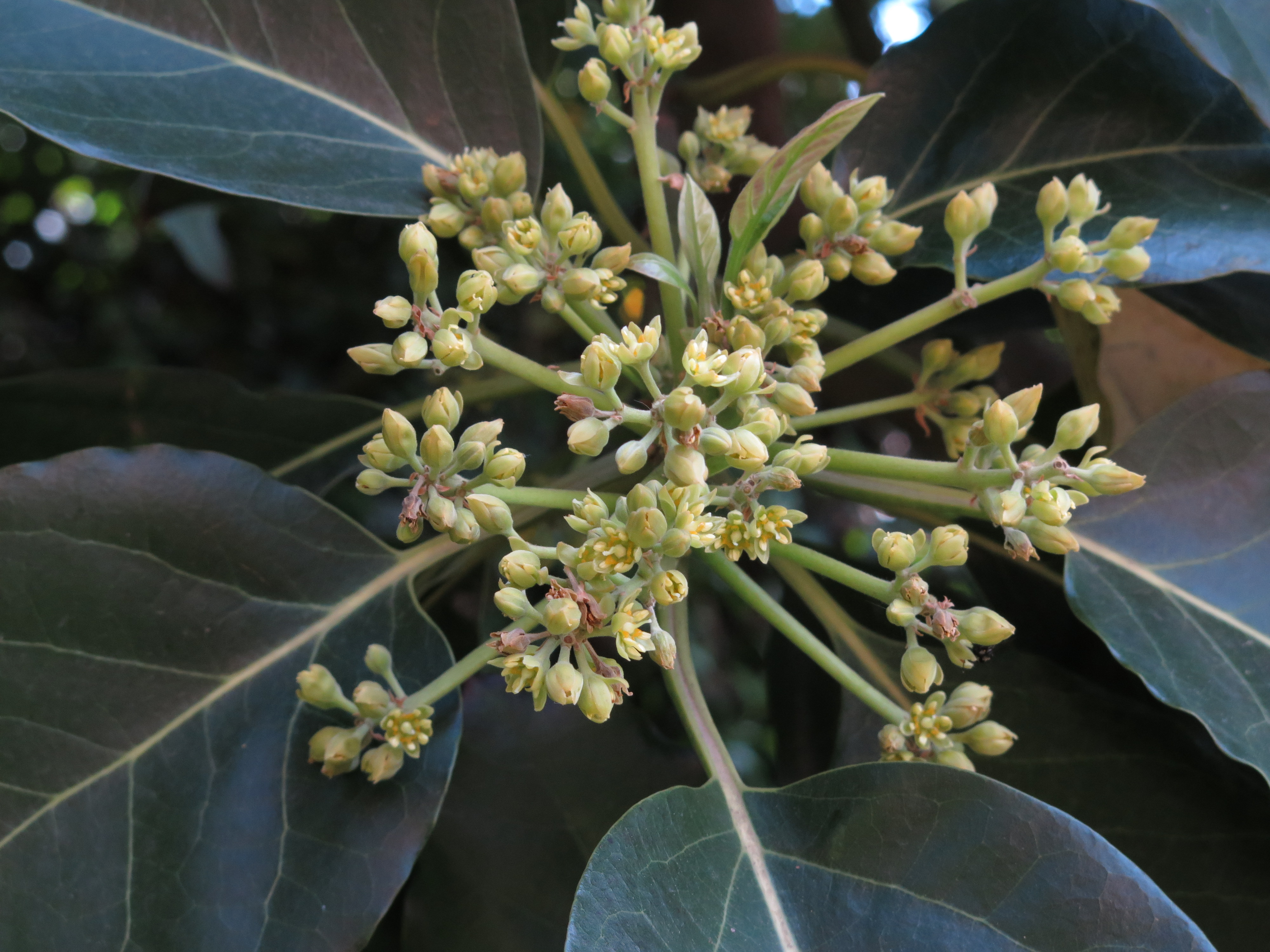 I fiori della persea americana